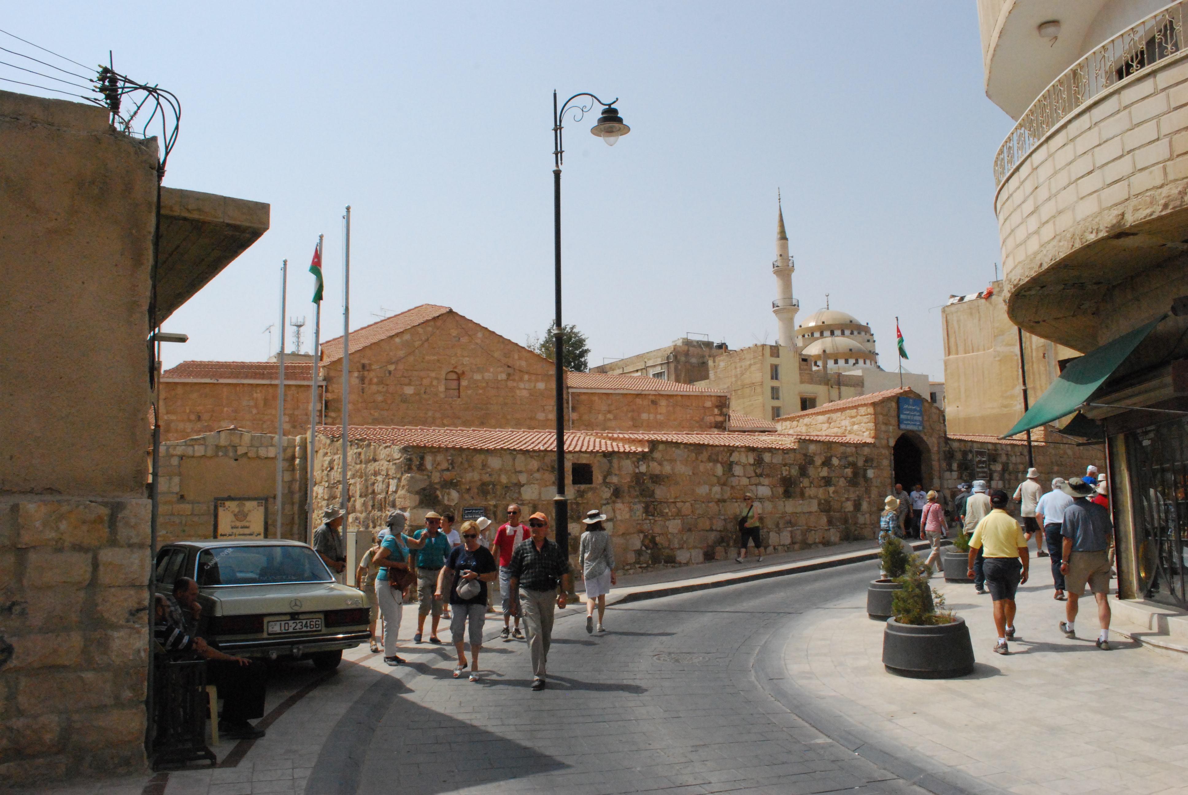 Madaba : Abu Bakr Al Siddiq Street.